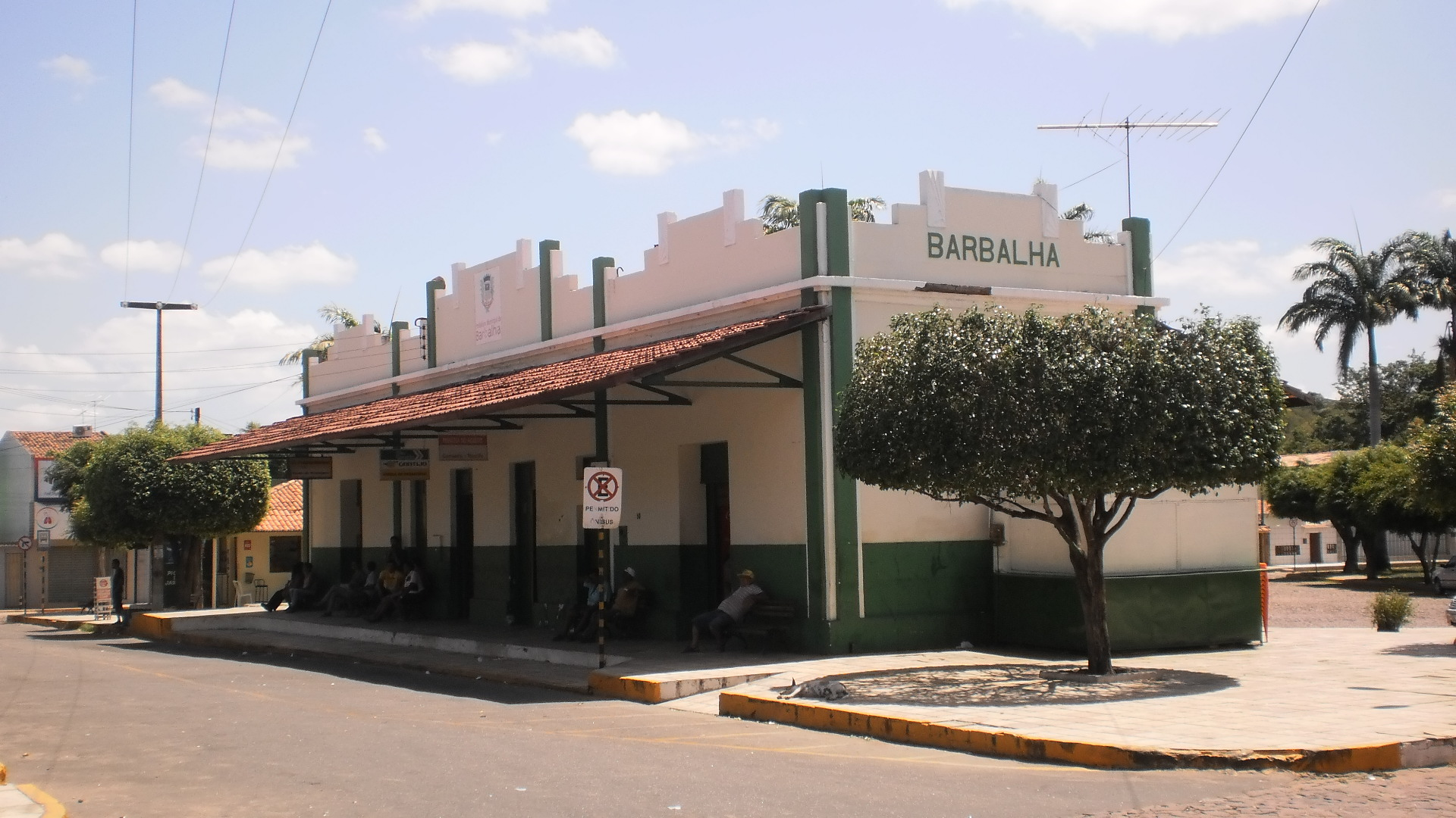 Prédio da antiga estação ferroviária de Barbalha. Atual rodoviária.